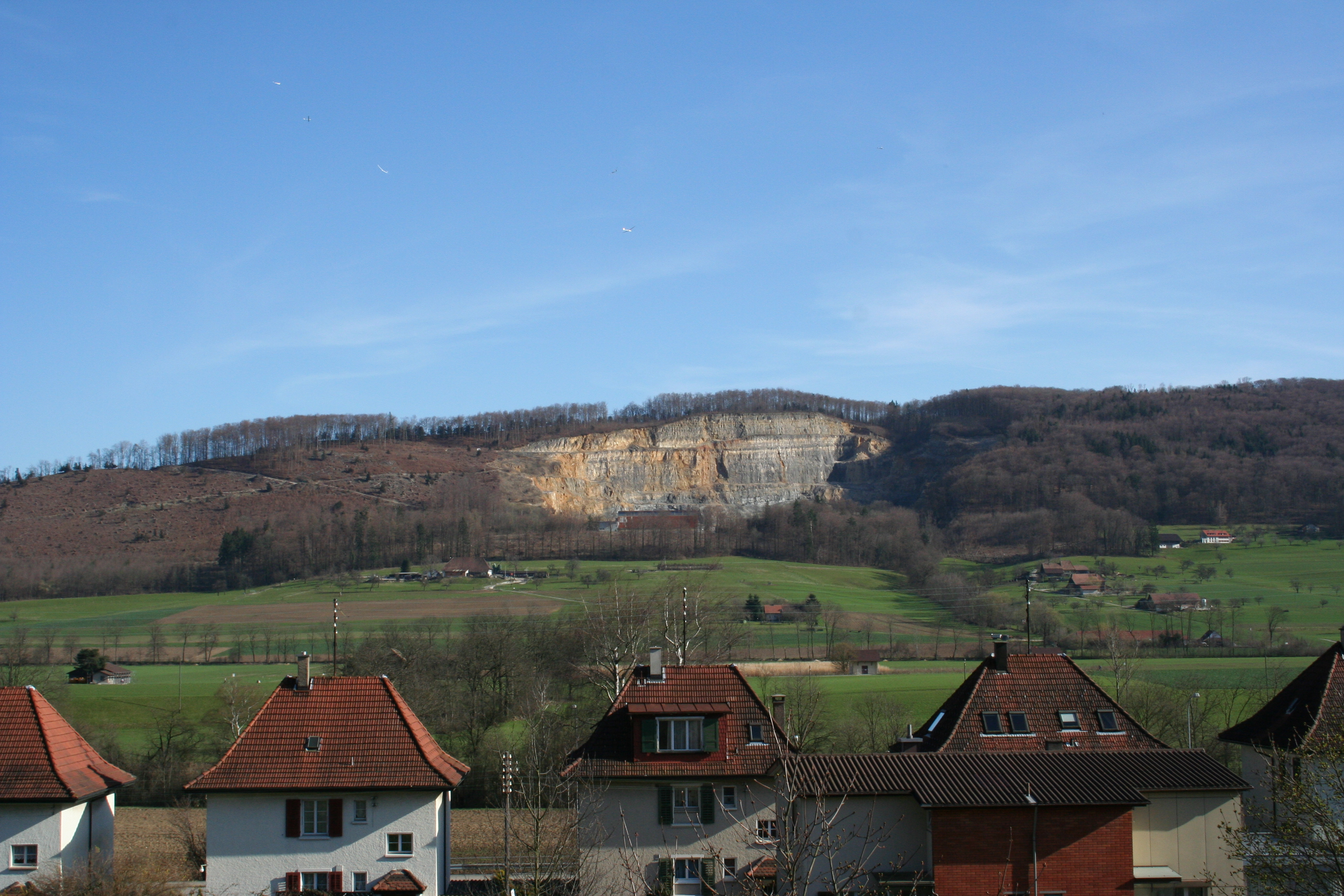 Born (Berg im Jura), aufgenommen in Wangen bei Olten Autor: Nicolas Born